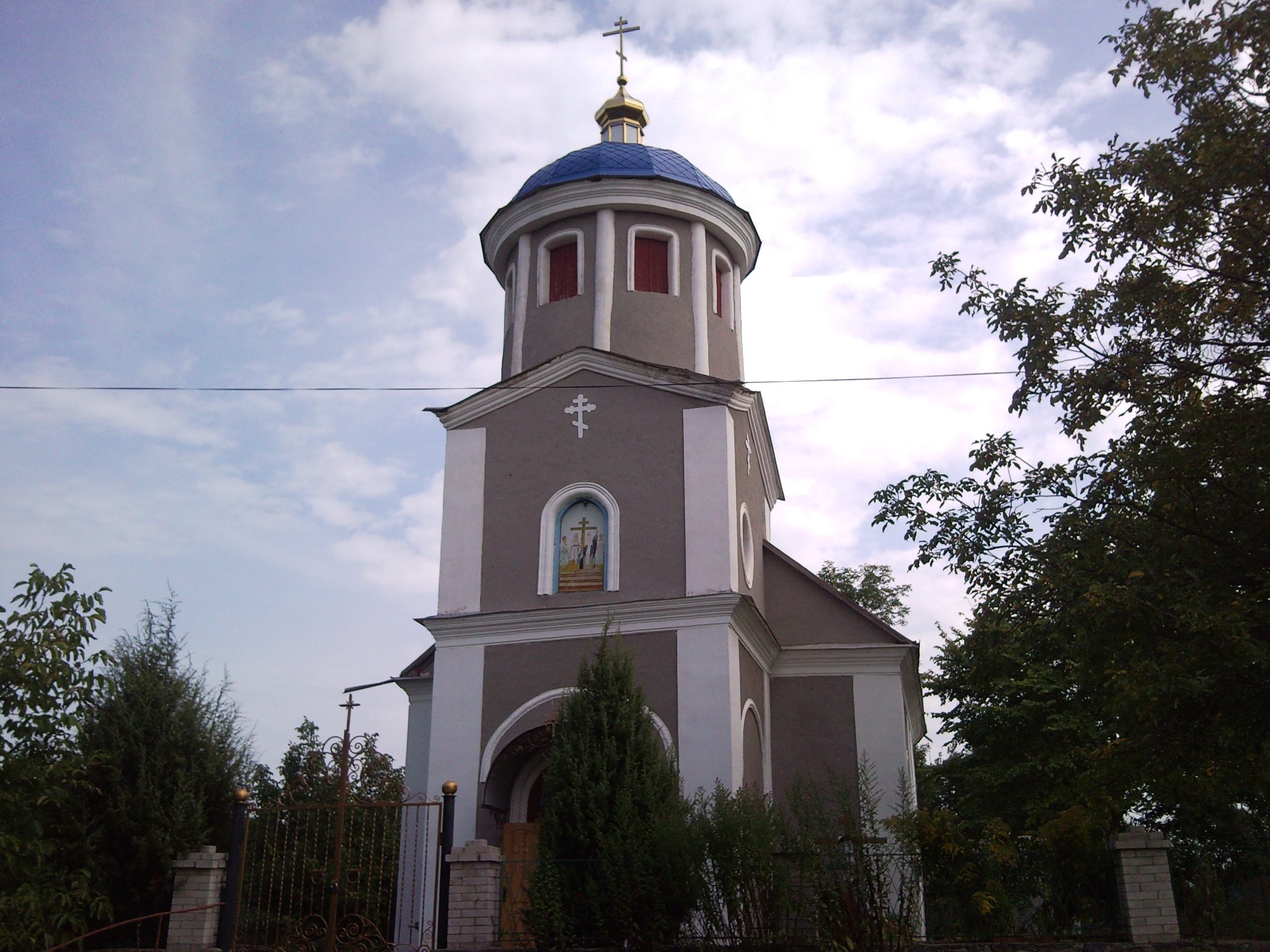 Шершні Церква Воздвиження Чесного Хреста